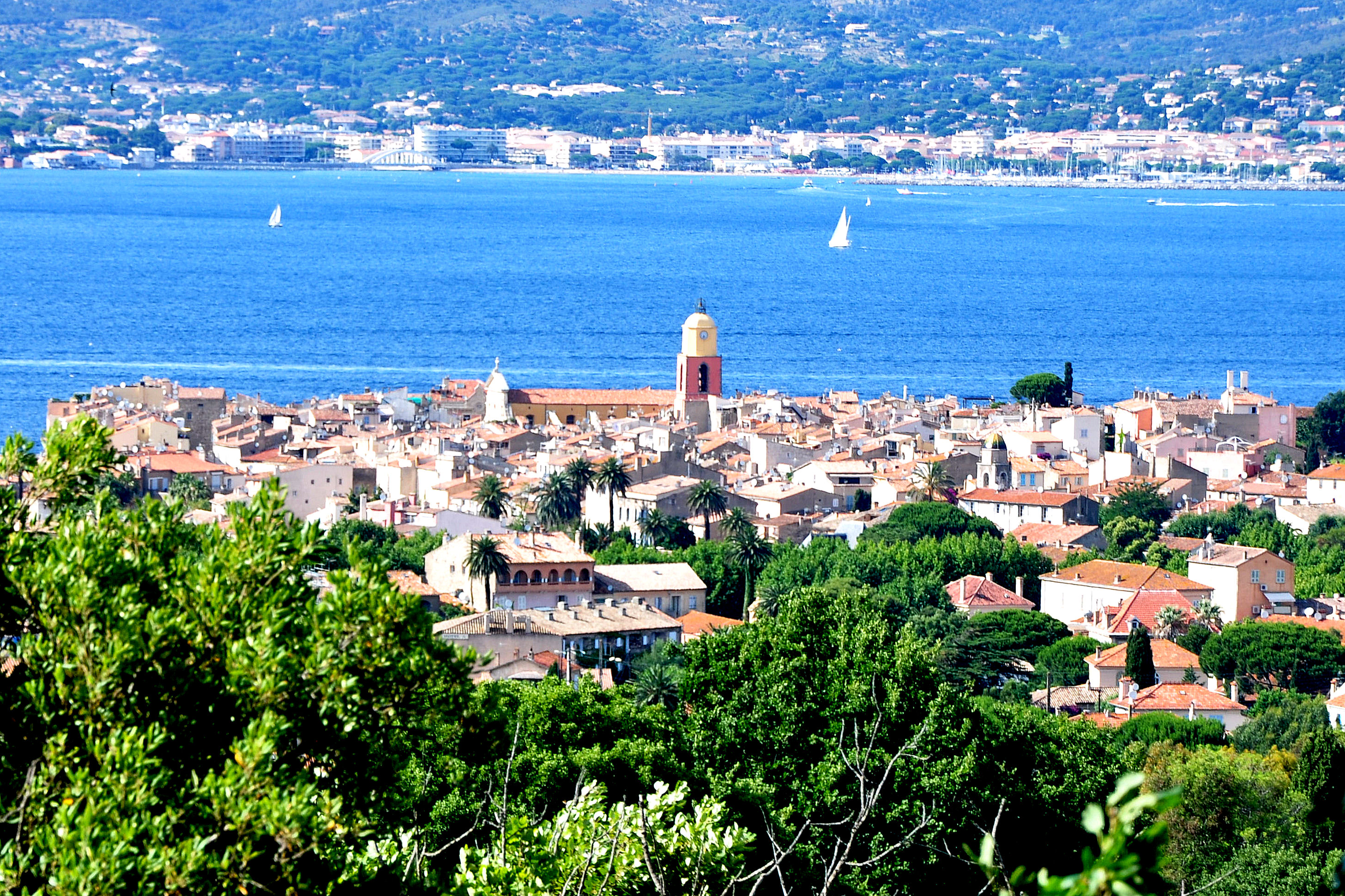 Saint-Tropez - Vue générale